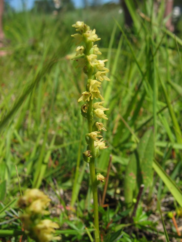 Einknollige Honigorchis Herminium monorchis, Müritz-Gebiet